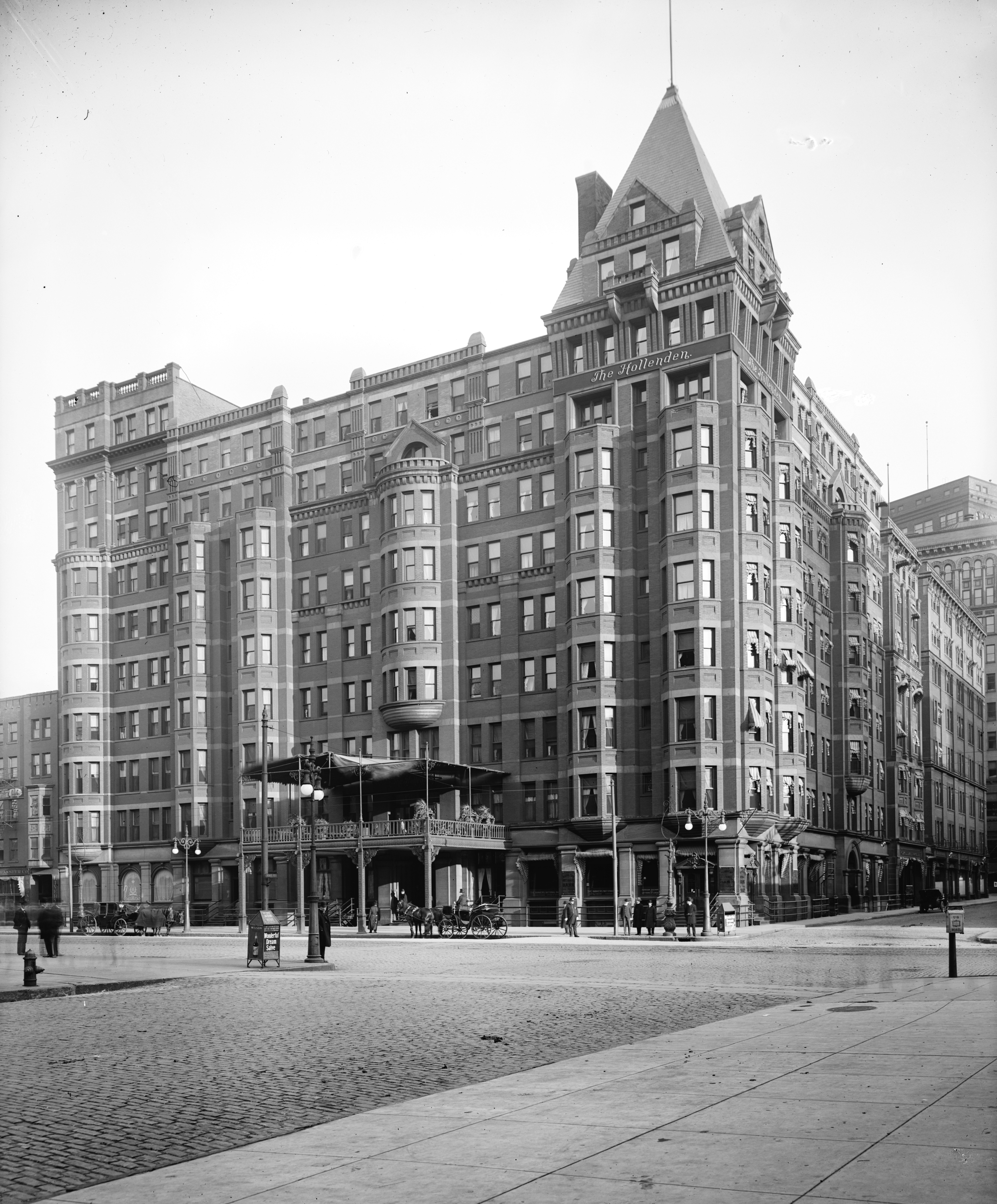 Hollenden Hotel in Cleveland, Ohio (opened in 1885, demolished in 1962)